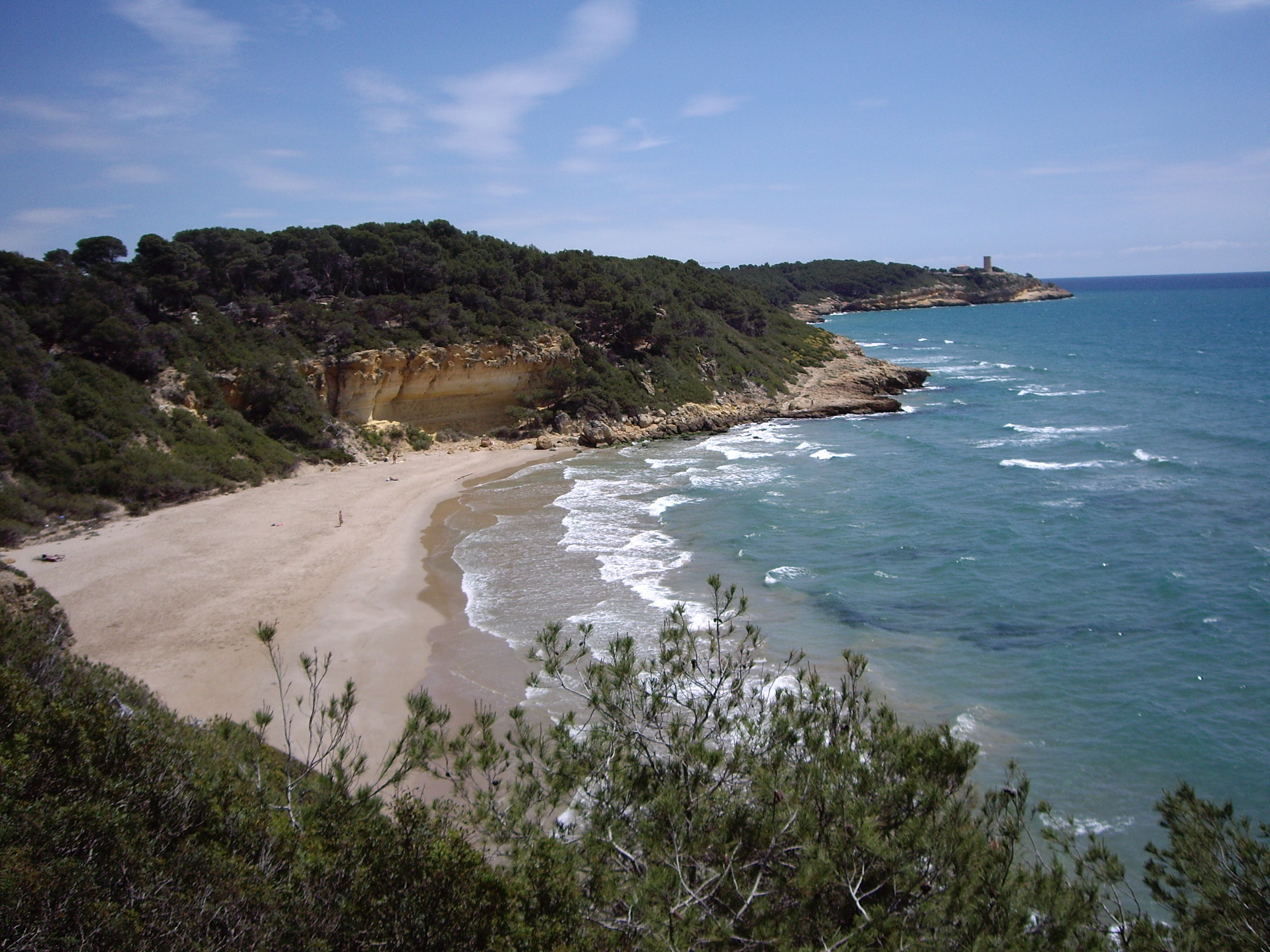 Vistes de Cala Fonda